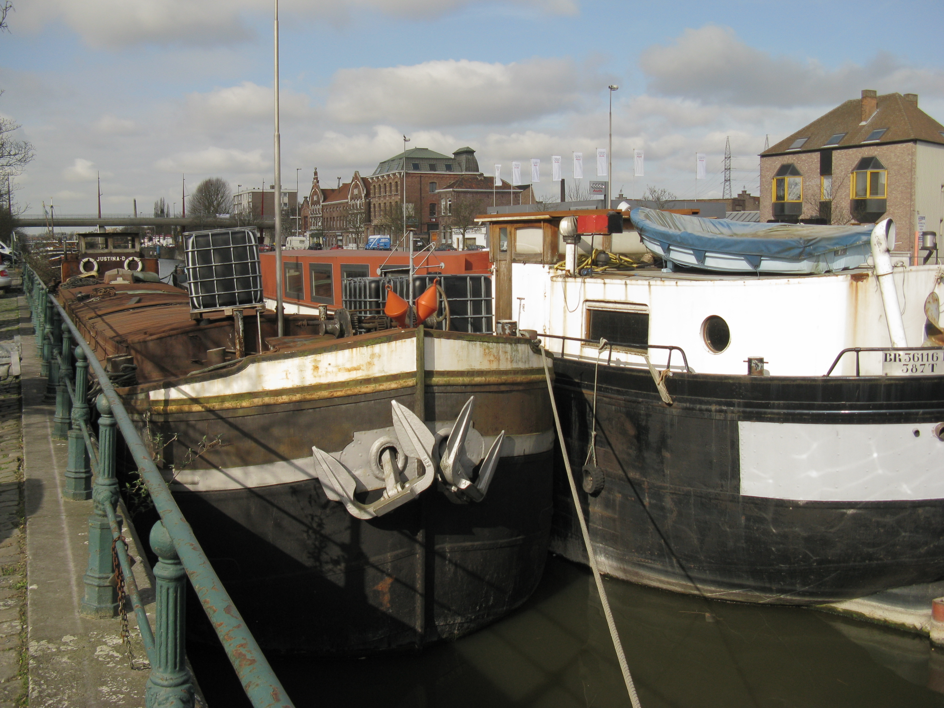 Boten van een firma die binnenschepen ombouwt tot woonboten aan de Nieuwe Vaart/Gasmeterlaan in Gent.